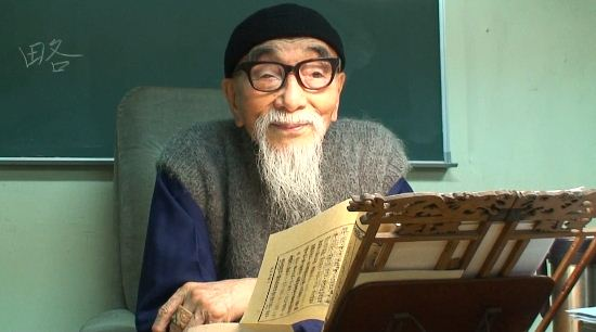 毓鋆講《孫子》兵法之神態。